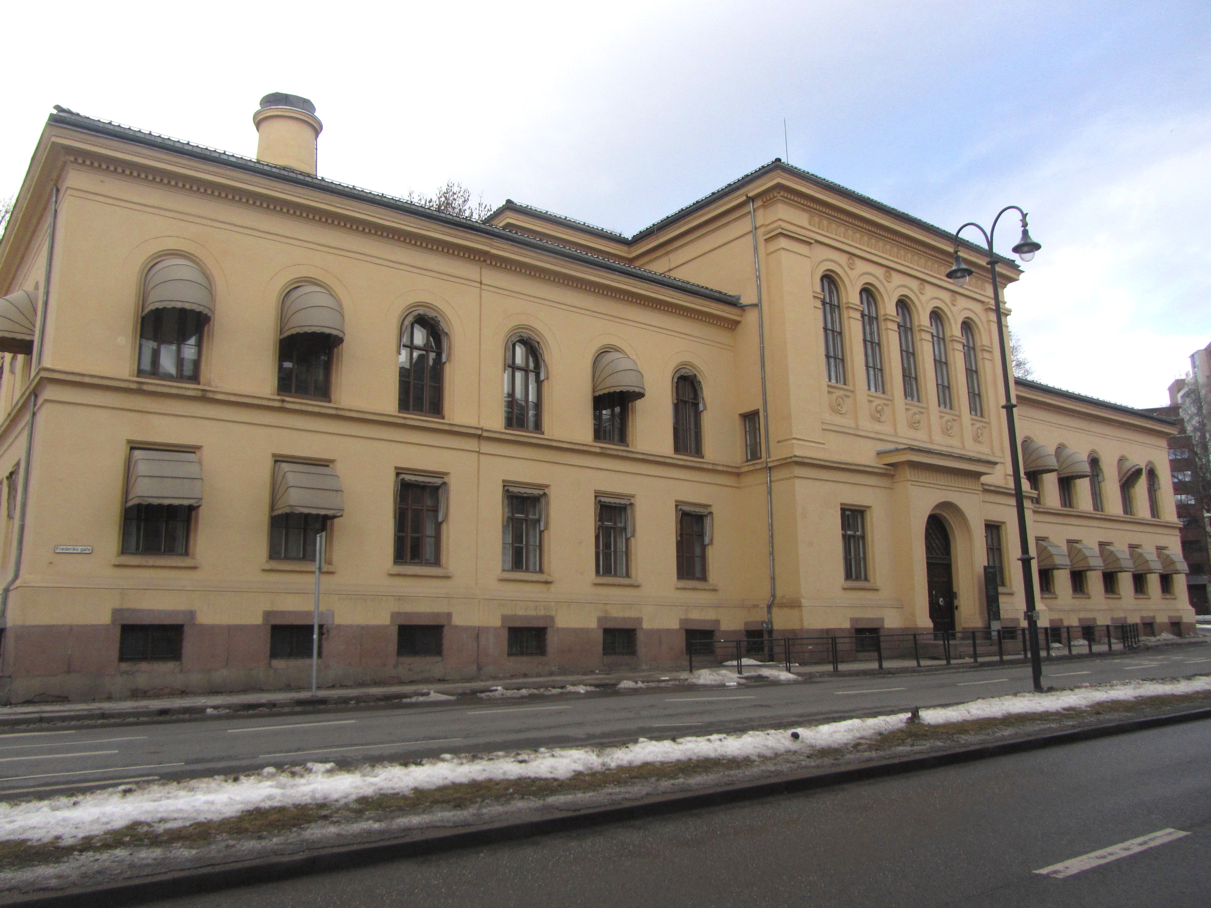 Domus Chemica er det offisielle navnet på en bygning i Frederiks gate 3 i Oslo som tilhører Universitetet i Oslo (UiO). Oppført i 1875 etter tegninger av Georg Andreas Bull. Den var bygget som kjemisk-metallurgiske laboratorier for Universitetet, derav navnet. Fra 1939 overtatt av Oldsaksamlingen ved Universitetet i Oslo.